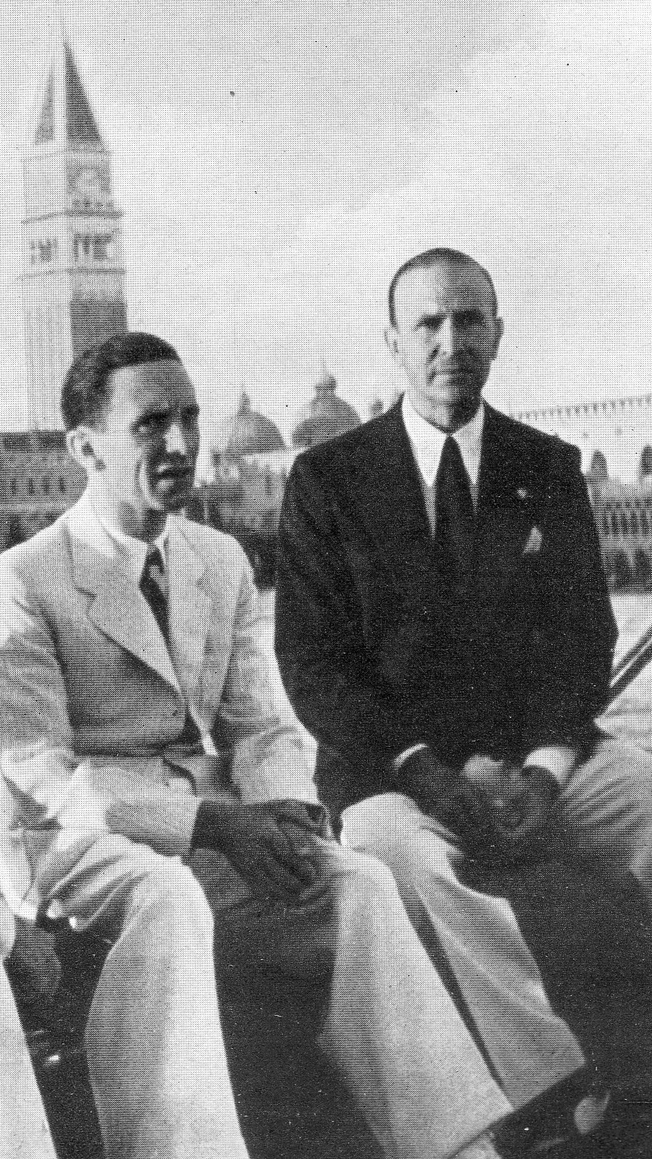 Dino Alfieri e Goebbels a Venezia